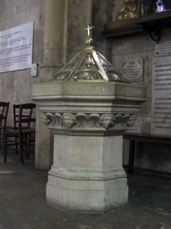 Fonds baptismaux de l'église Notre-Dame-des-Vertus (Aubervilliers)